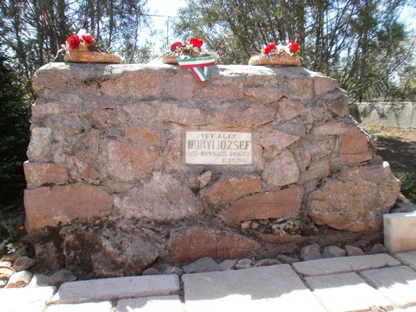 Irinyi József-emlékmű, Albis, Románia